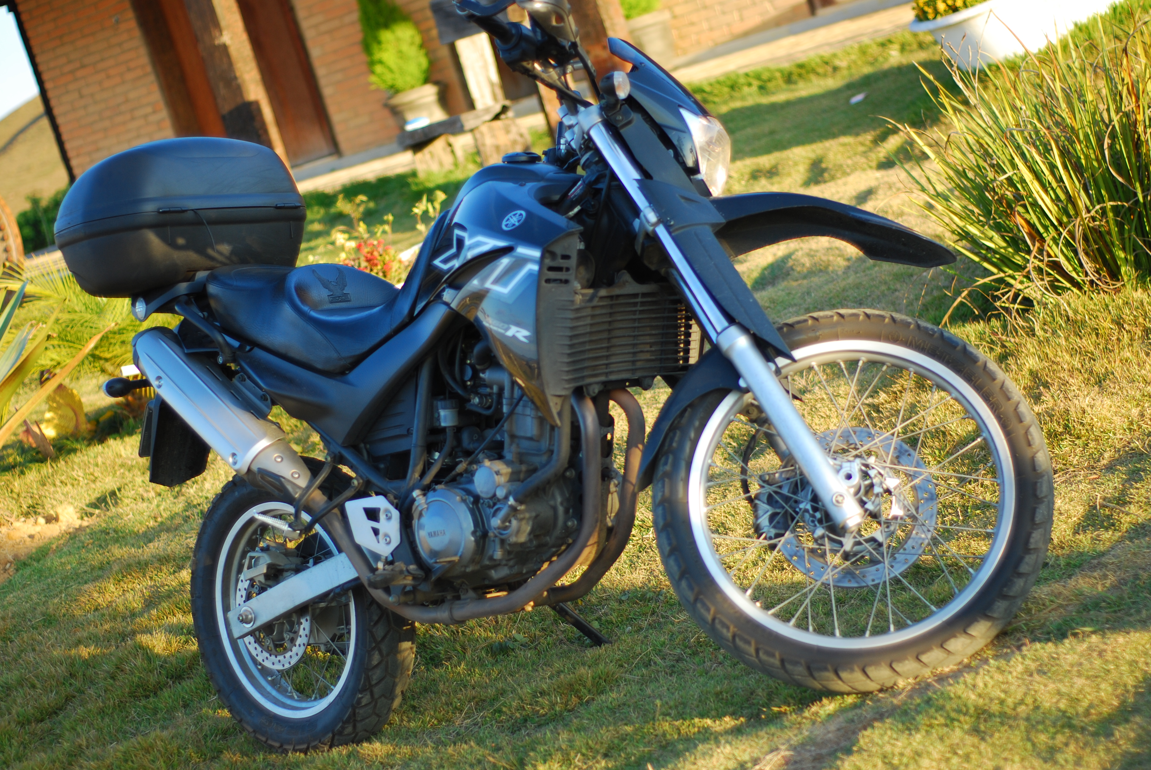 Yamaha XT 600